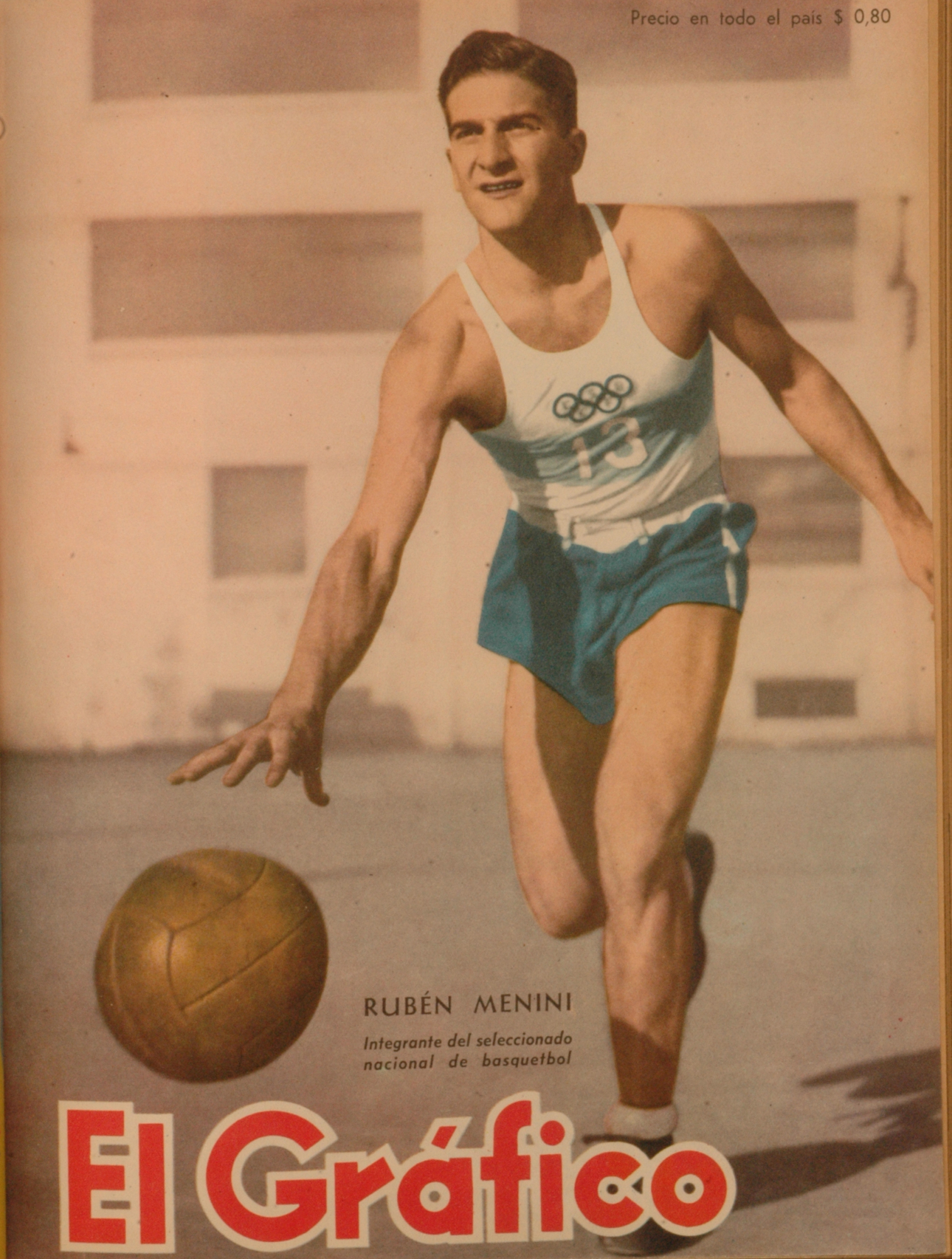 El Grafico del 09 de Marzo de 1951. Edicion 1648